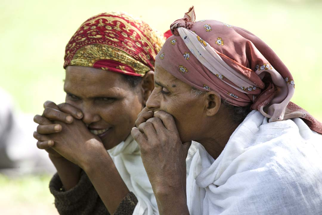 Ethiopia